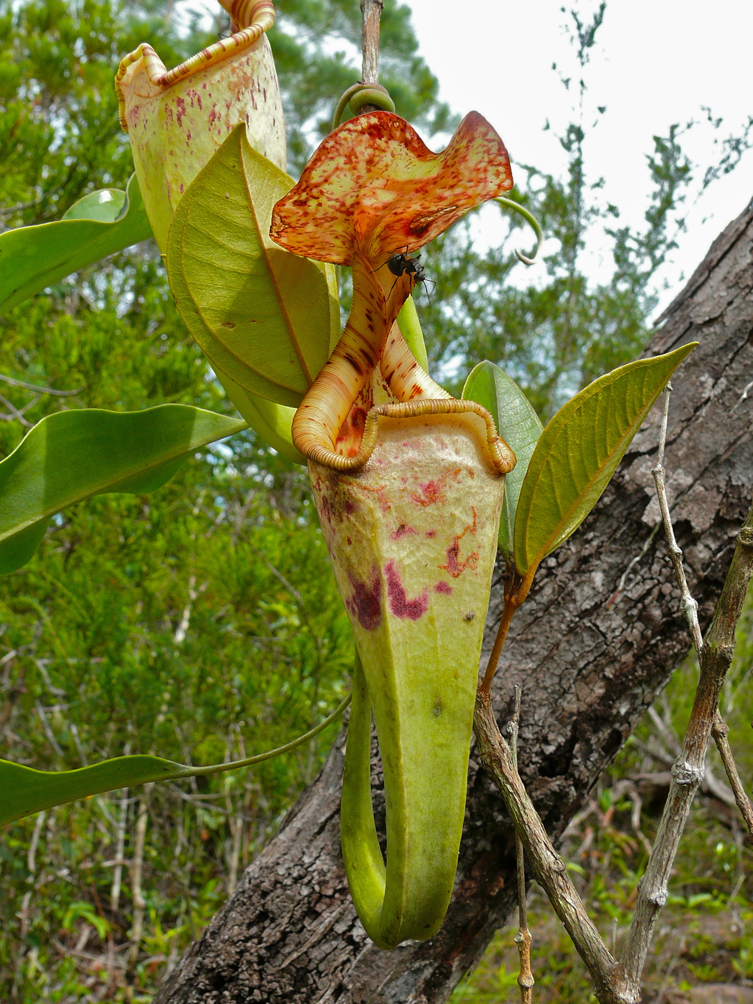 Bako NP, Sarawak, MALAYSIA